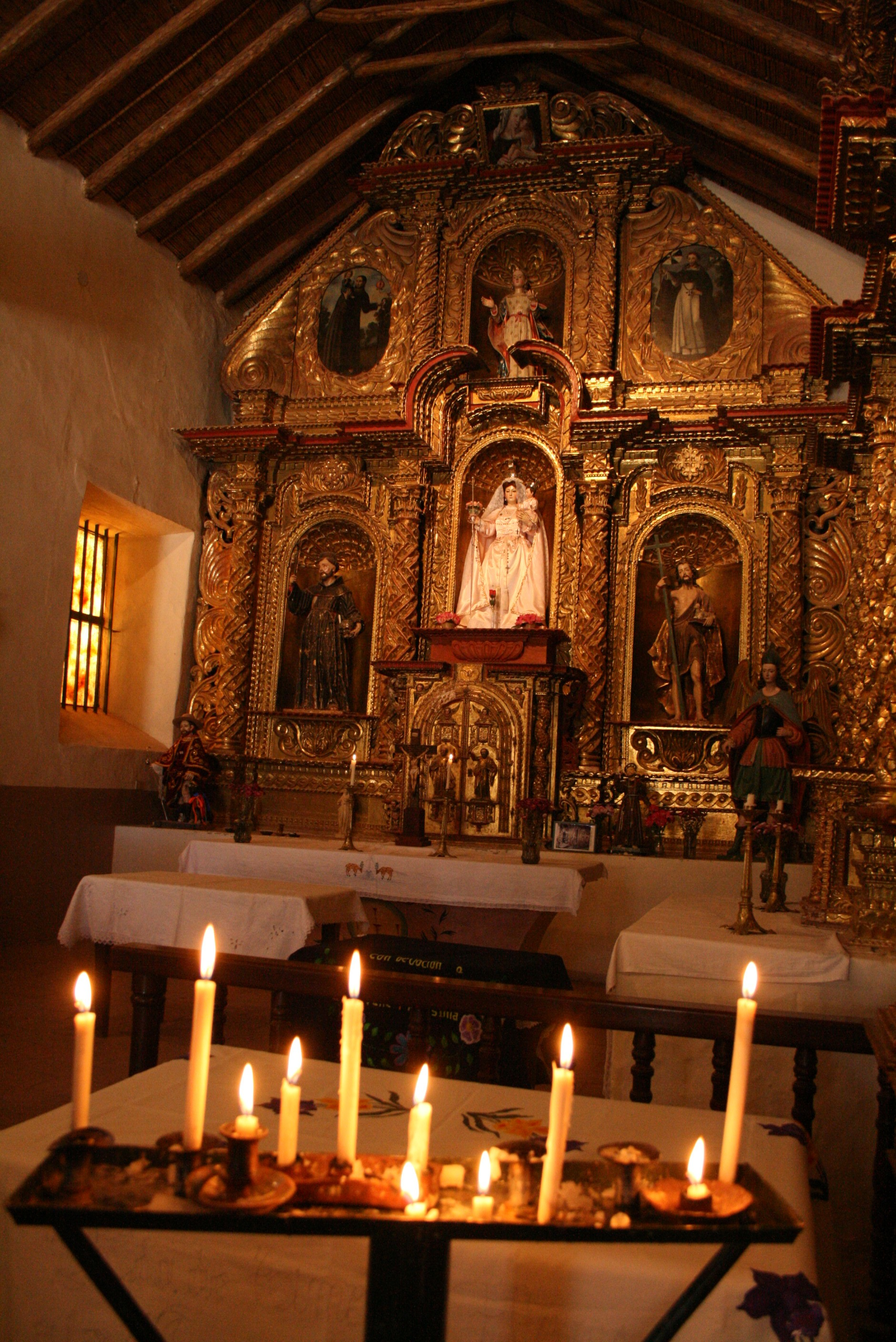 Capilla de Yavi